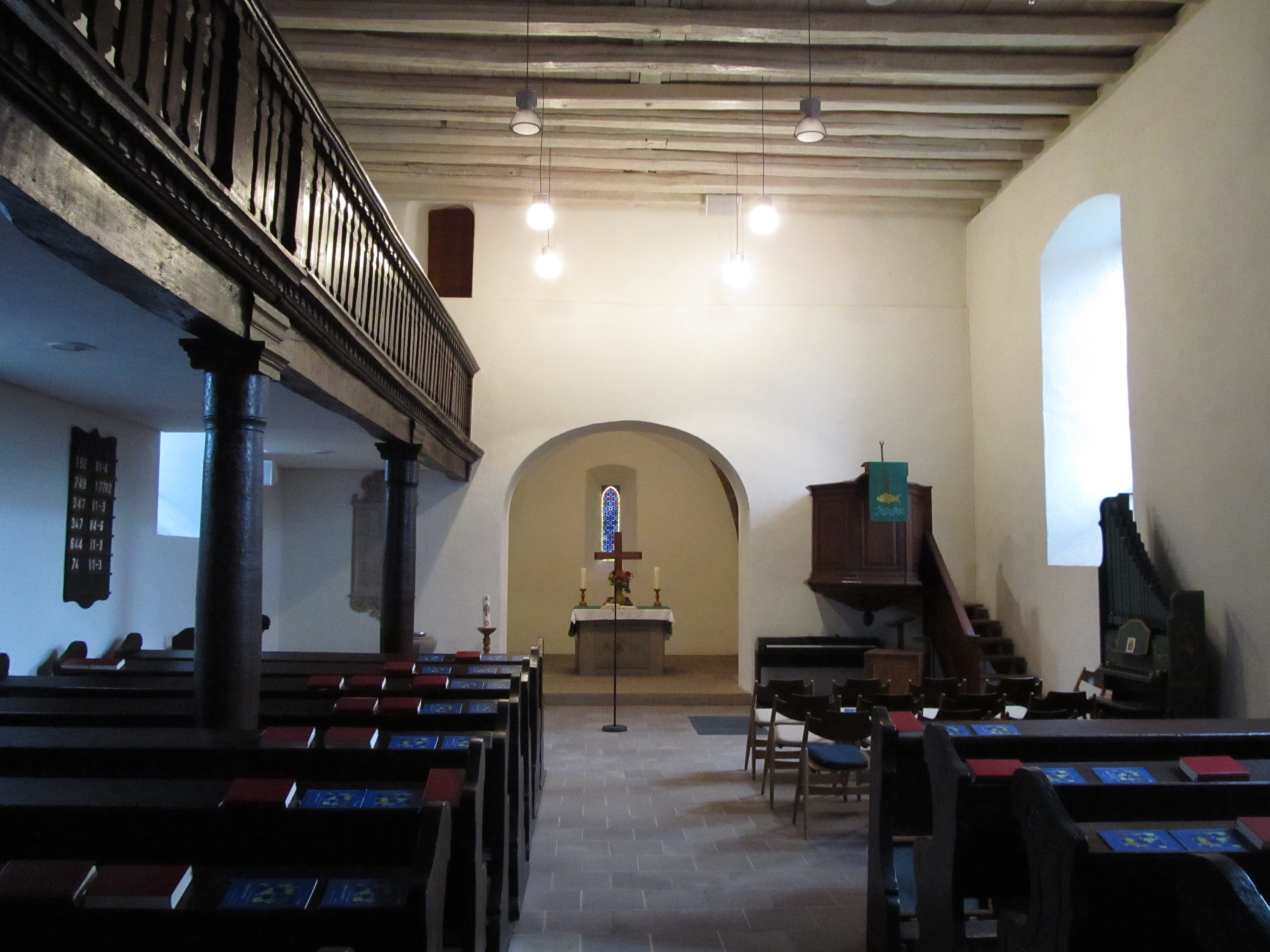 Blick ins Innere der protestantischen Elisabethkirche in Limbach, Gemeinde Kirkel, Saarland